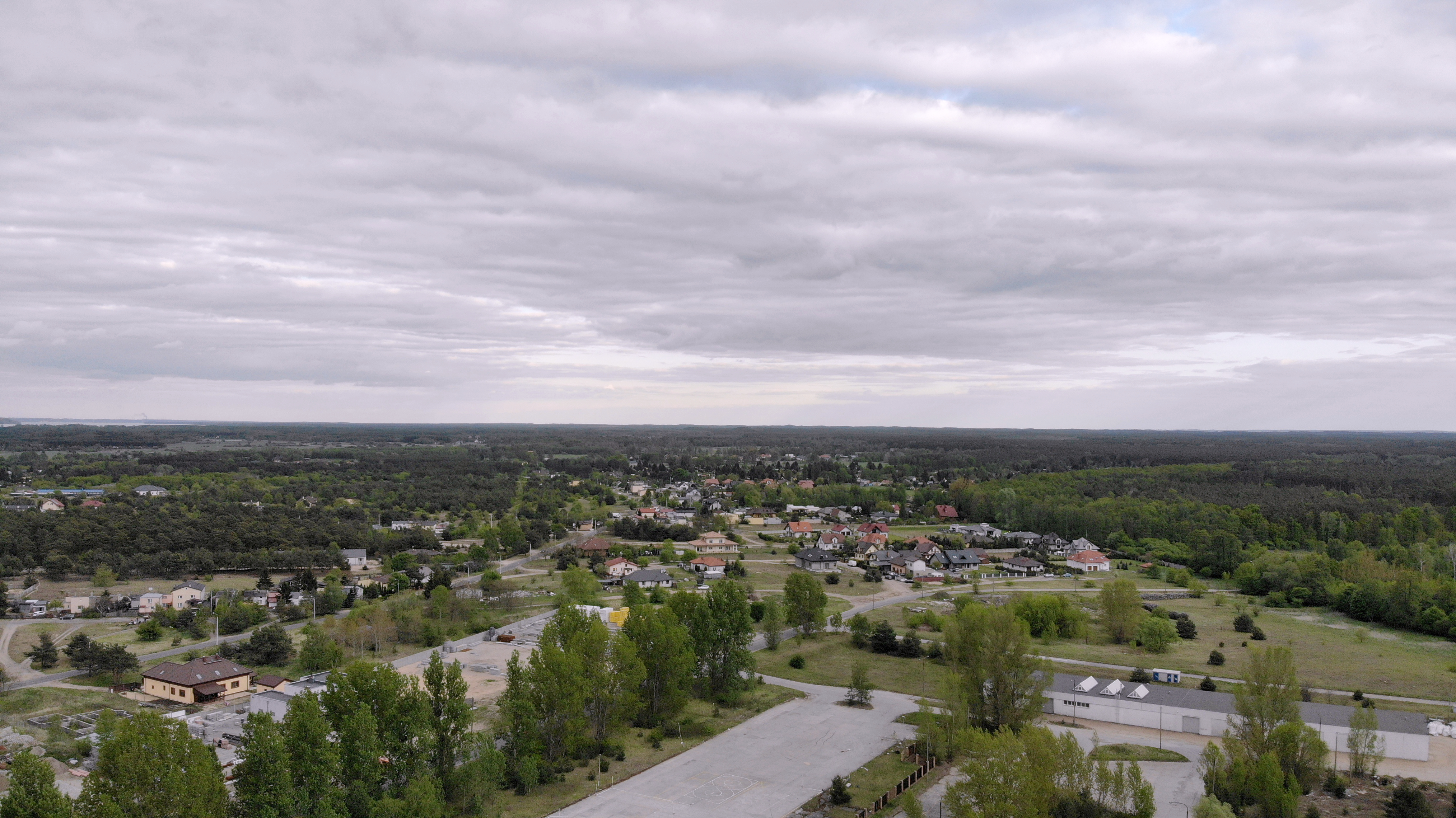 Kazimierza Wielkiego (2020 r.)